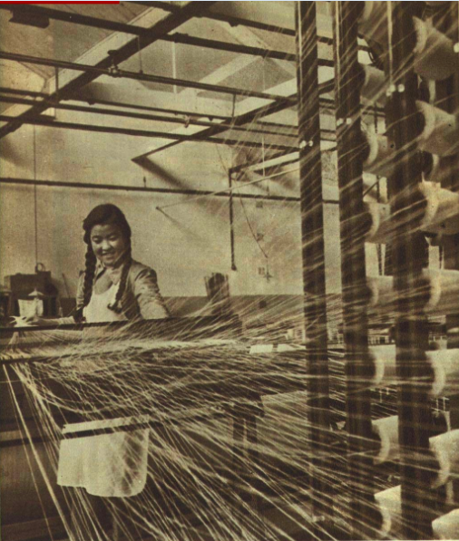 上海第二棉纺织厂 1952年